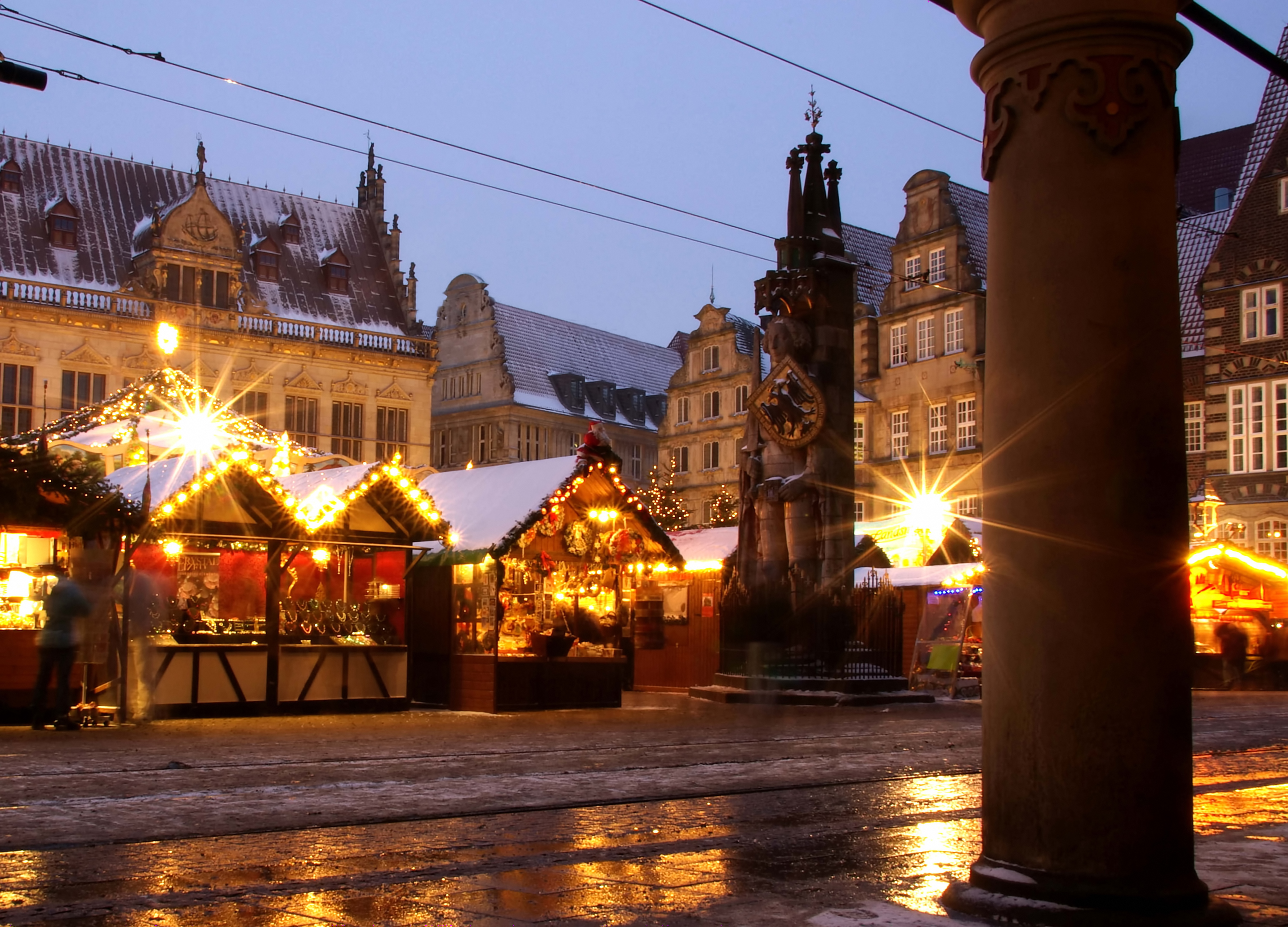 Der Bremer Weihnachtsmarkt im Jahr 2009. Blick von den Rathausarkaden auf den Marktplatz mit dem Roland, hinten links der Schütting.